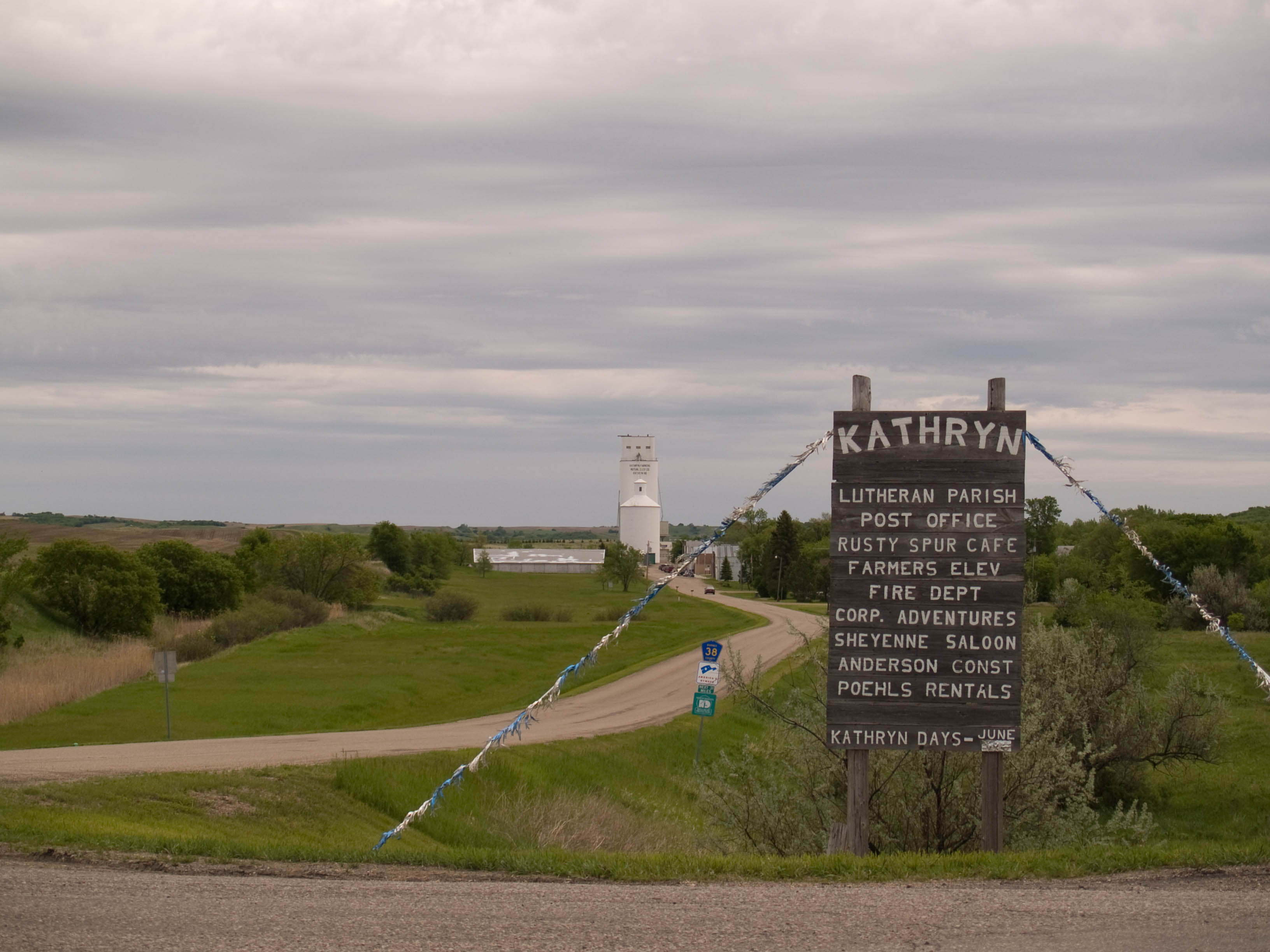 Kathryn, North Dakota